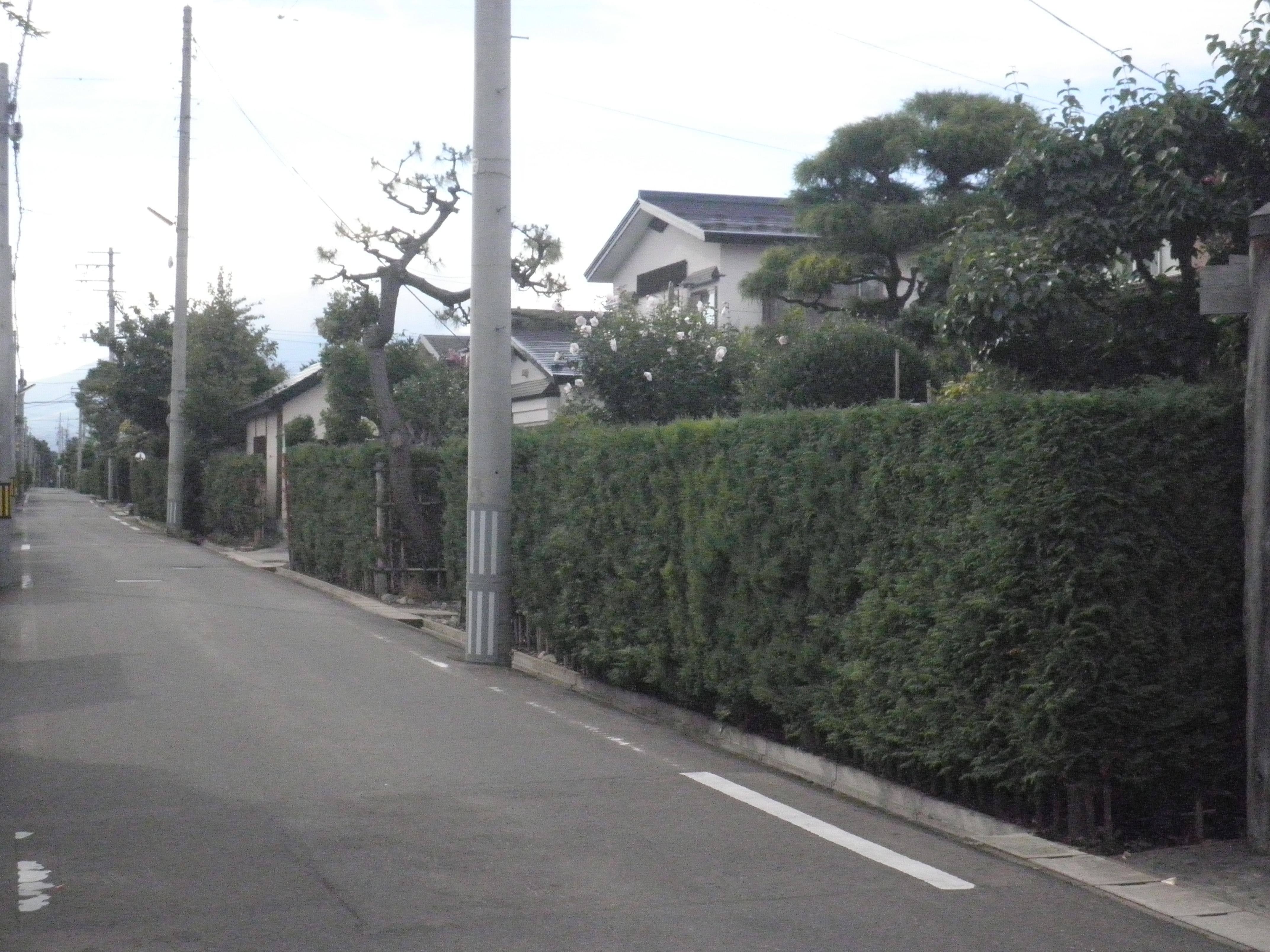 重伝建に指定されている弘前市仲町